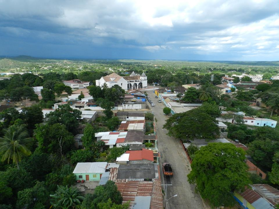 iglesia de clarines